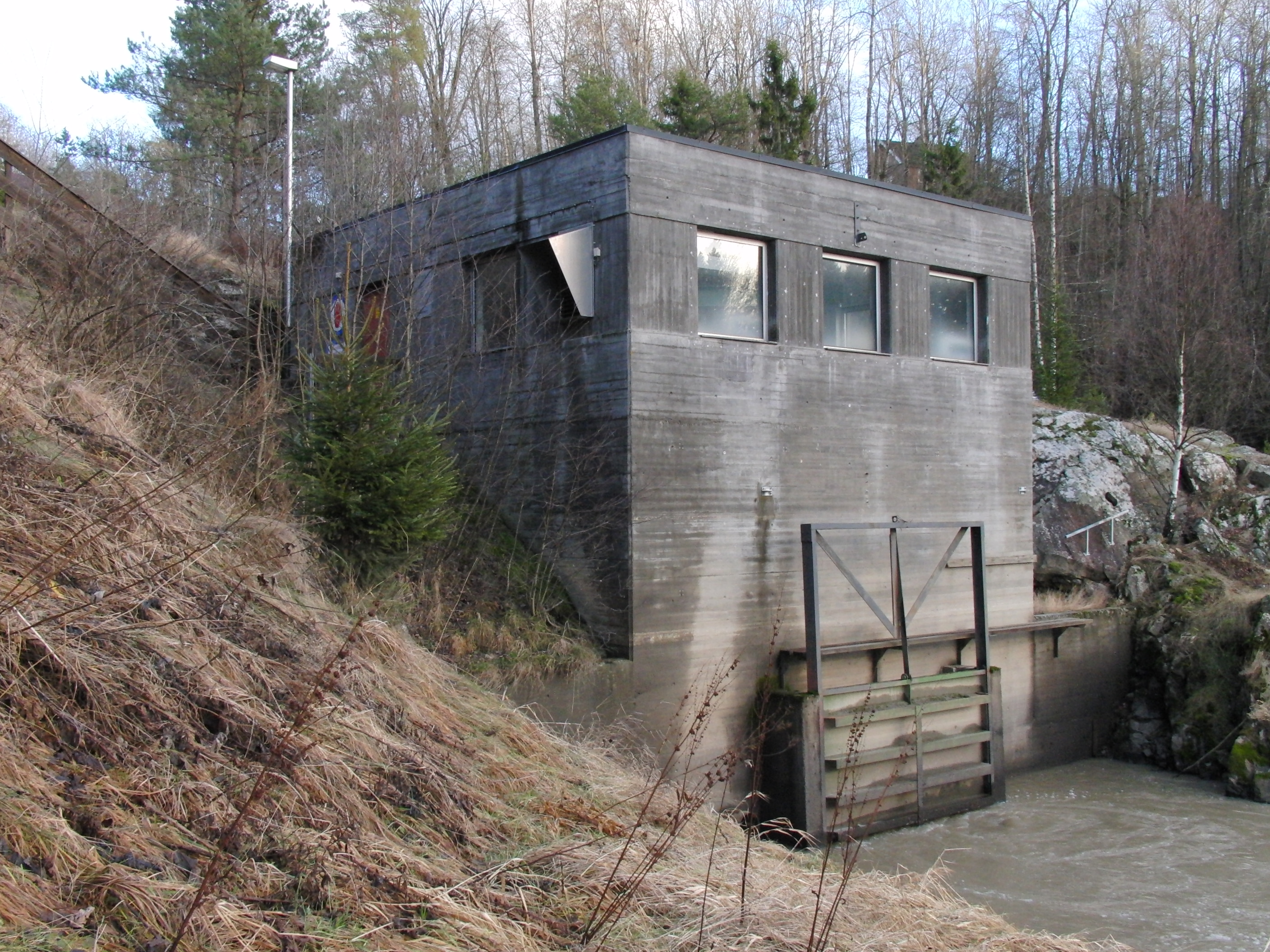 Lekum kraftverk